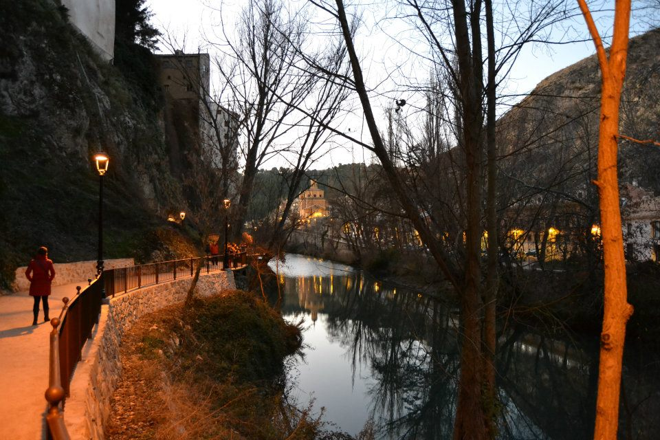 Río Júcar a su paso por Cuenca